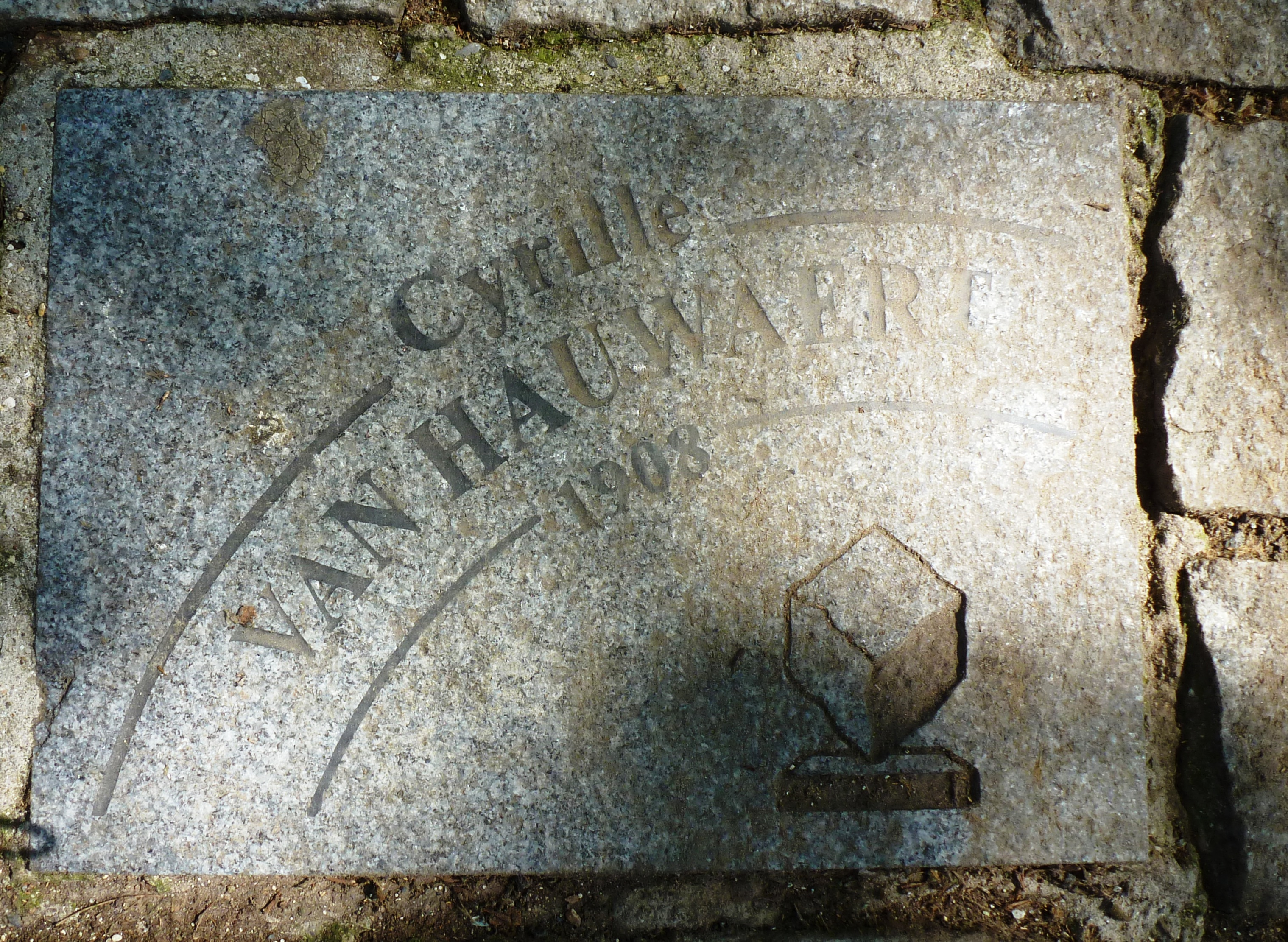 Pflasterstein für Cyrille Van Hauwaert auf der Allee Charles Crupelandt in Roubaix